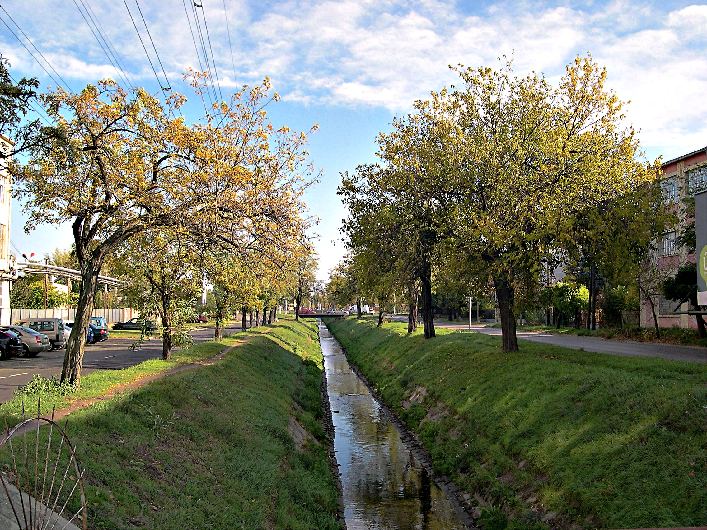 Rákos patak Budapest, XIV. kerület